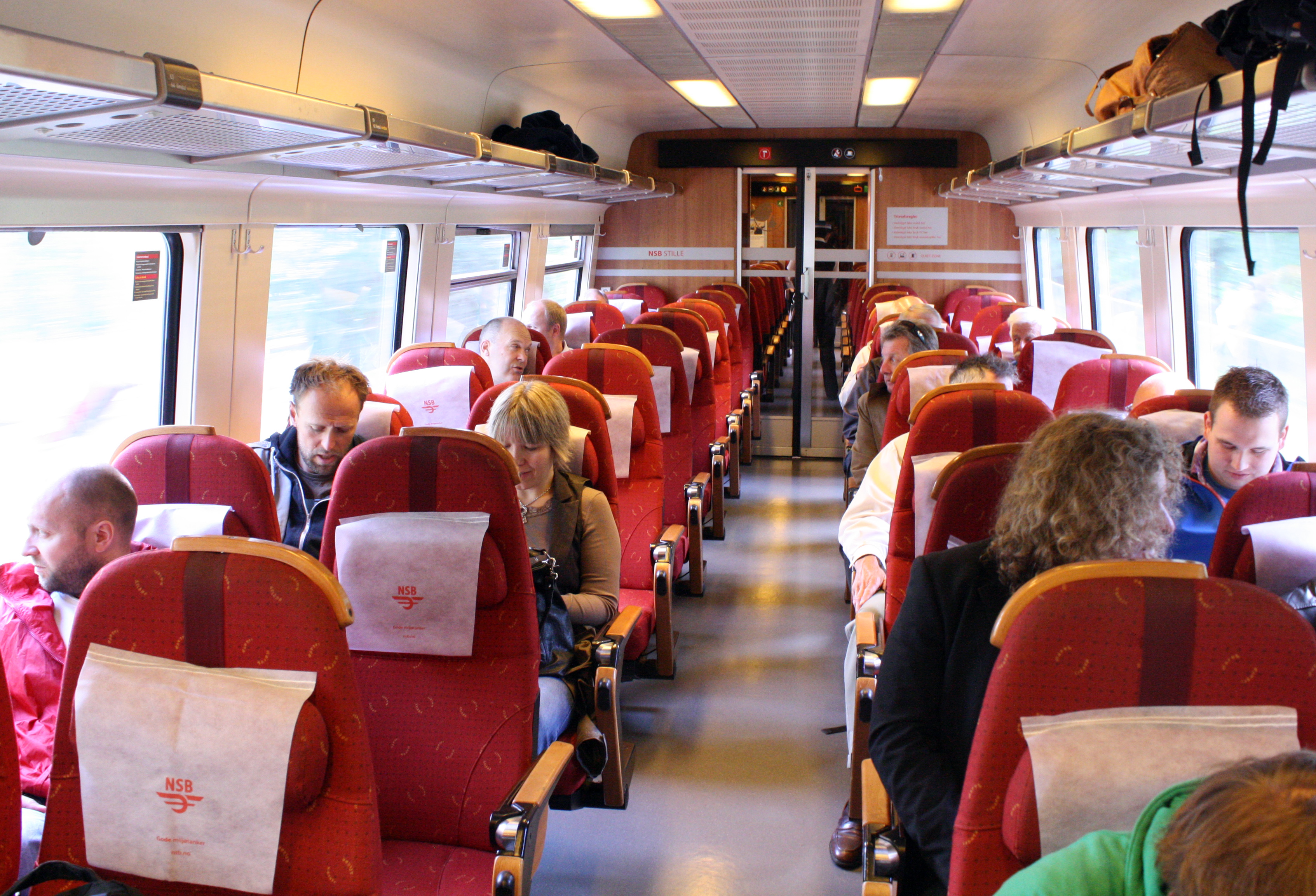 Kvalitetssikringsgruppens befaring startet med togtur til Hell.